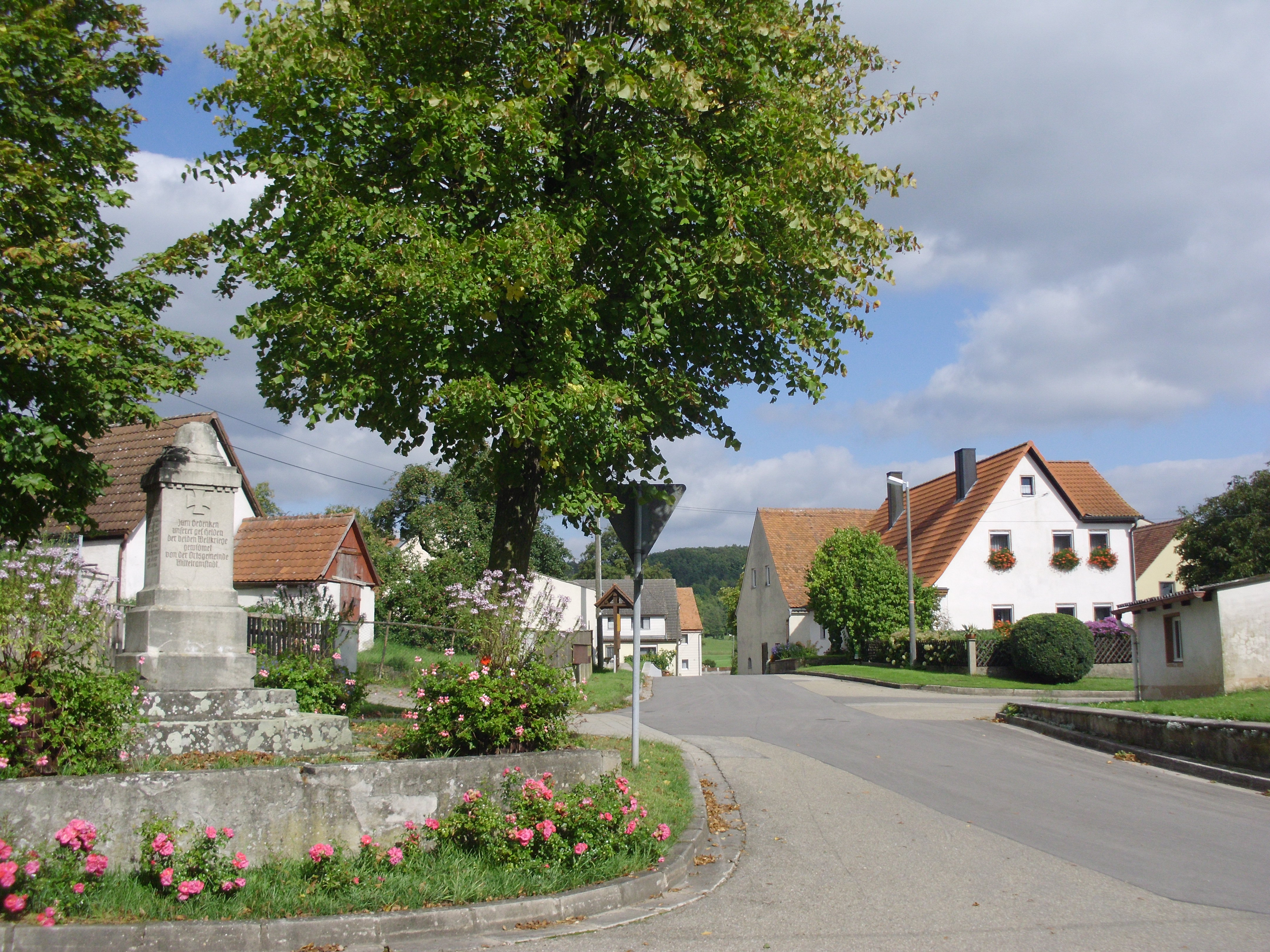 Mittelramstadt, Ortsteil von Leutershausen im Landkreis Ansbach, Ortsmitte mit Kriegerdenkmal